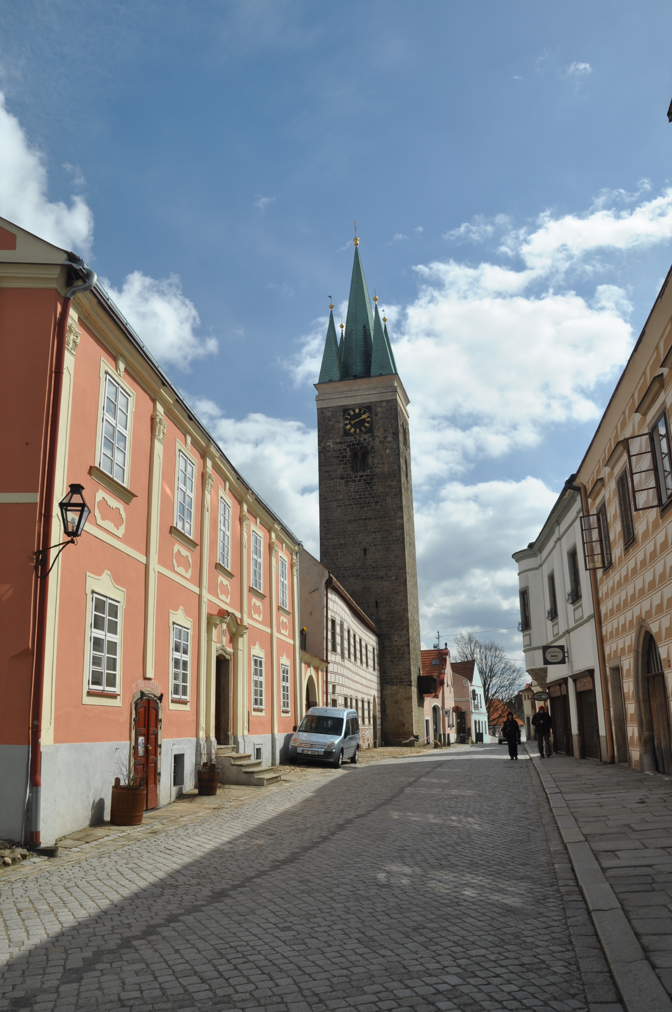 Věž sv. Ducha z Hradební ulice